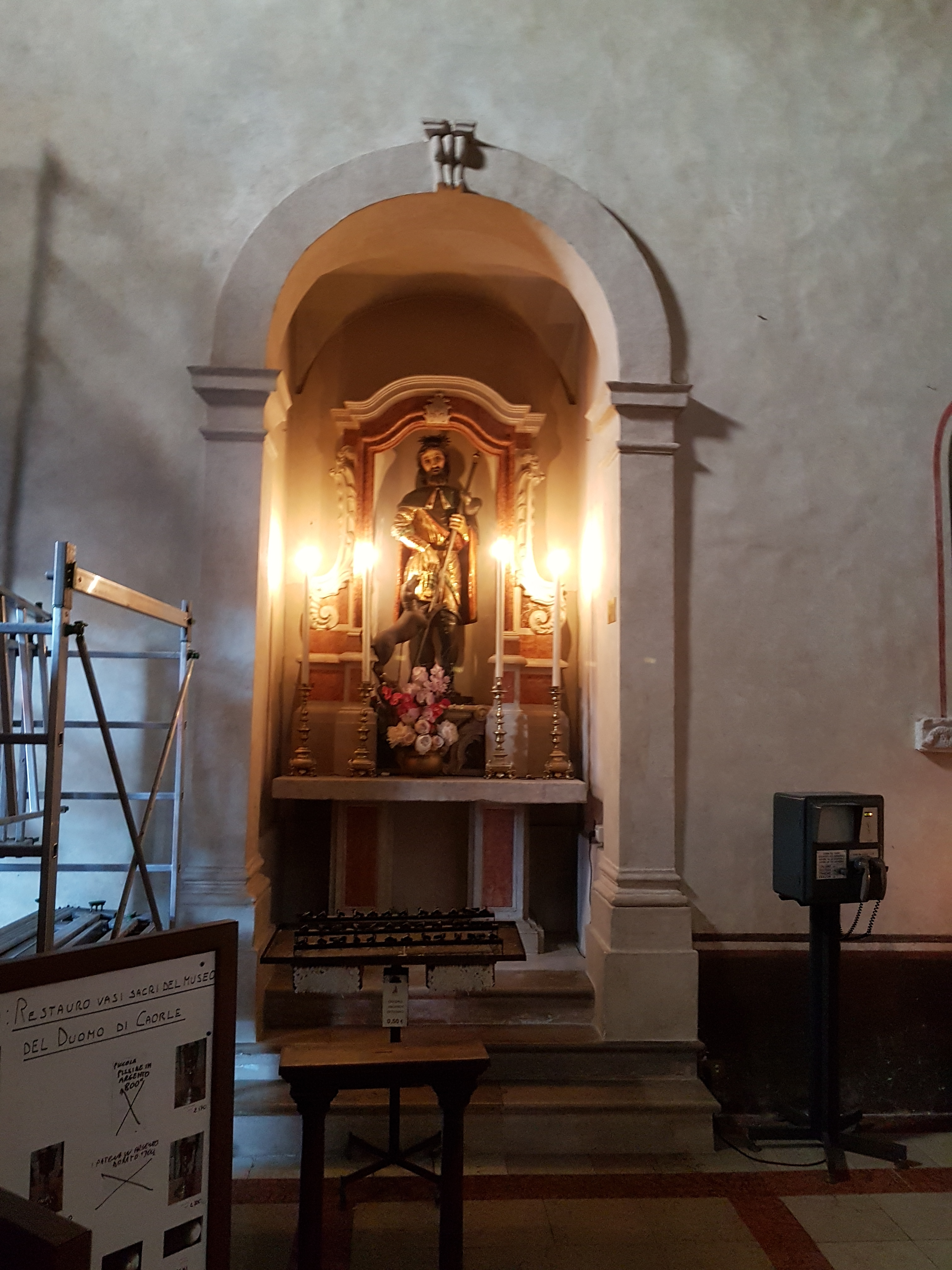 Duomo di Caorle